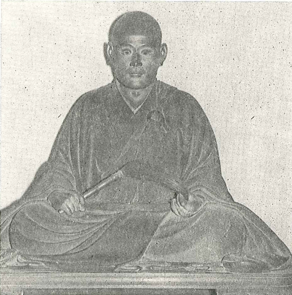 深草元政 彫刻